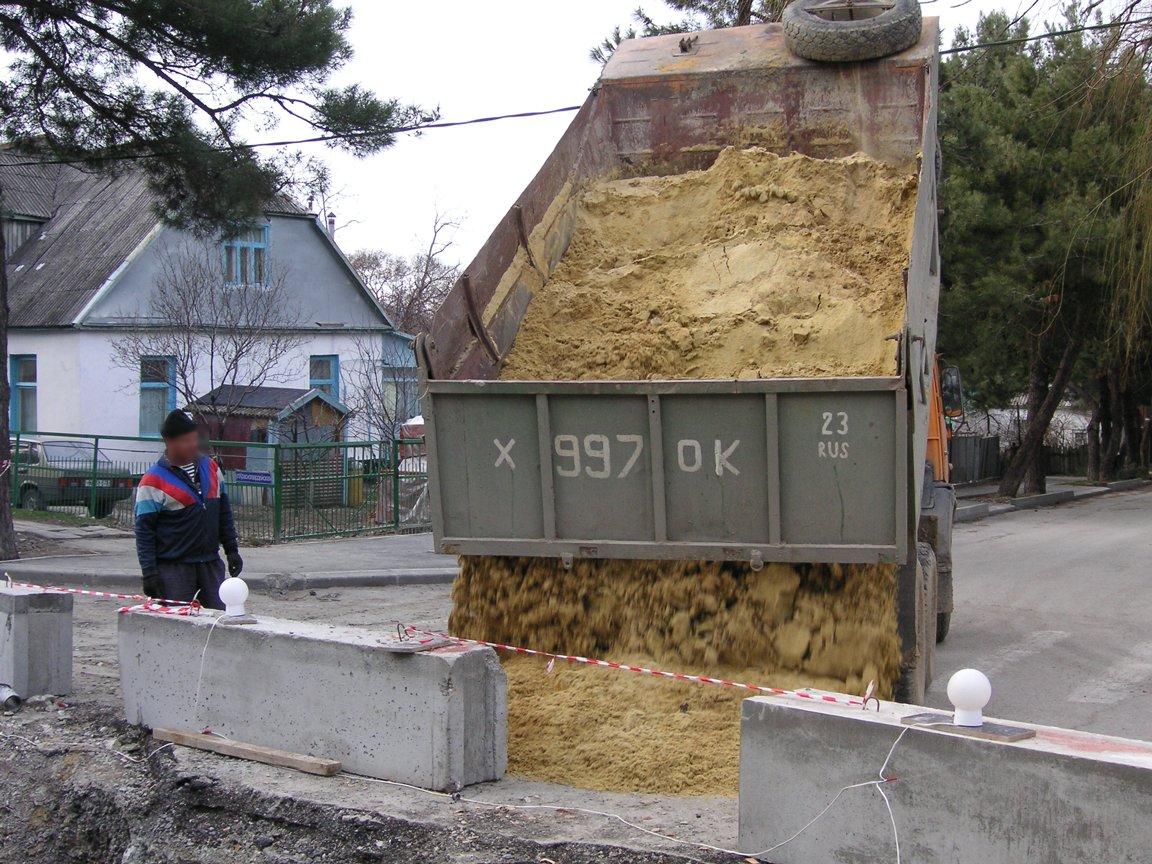 Разгрузка самосвала с песком. Самосвал разгружает полный кузов песка возле траншеи; стоящий рядом рабочий наблюдает за разгрузкой. Файл фотографии был загружен в Википедию непосредственно автором. Лицо человека на фотографии было заретушировано участником .:Ajvol:., первоначальная версия фотографии удалена.